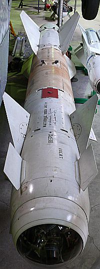 AS-14 Kedge